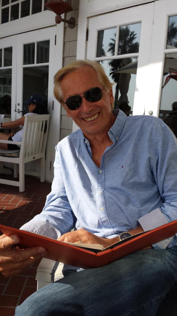 Rolf Mielkhe en California, Estados Unidos en 2015